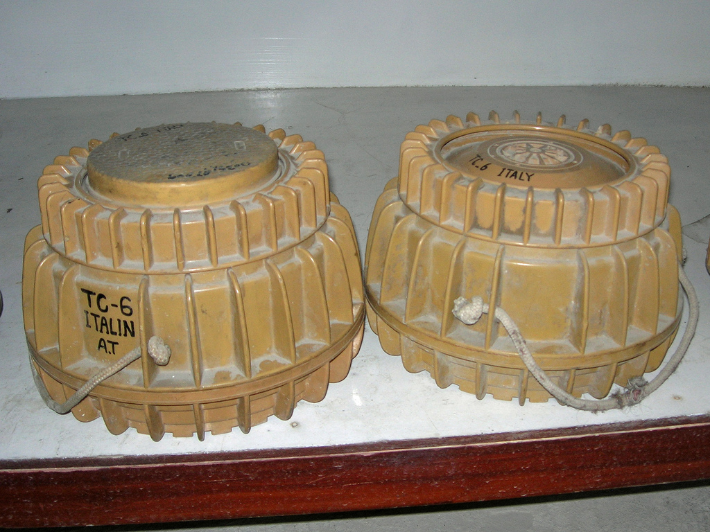 Anti-tank mines